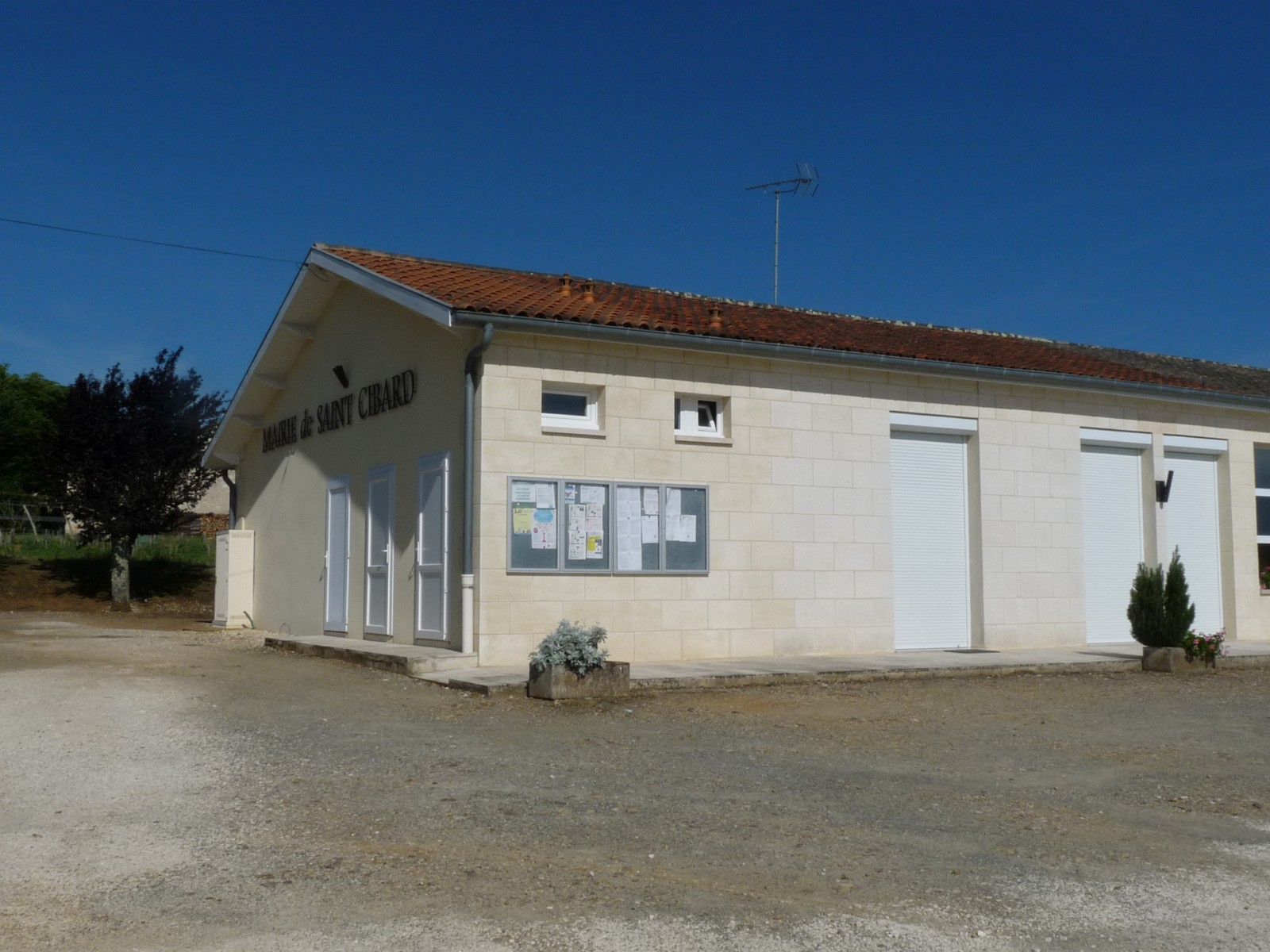 Mairie de St-Cibard, Gironde, France